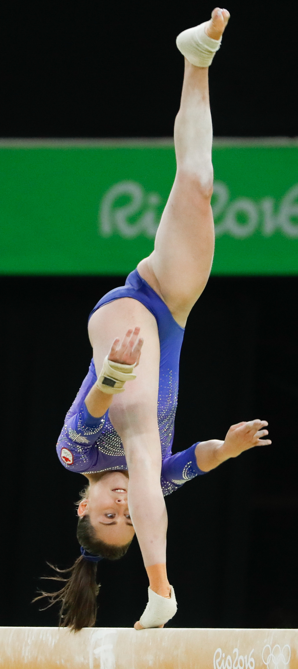 Rio de Janeiro - Ginasta do Canadá Isabela Onyshko termina final da trave na 8ª colocação (Fernando Frazão/Agência Brasil)